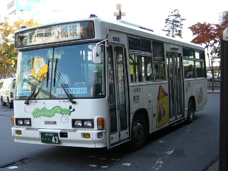 登録番号 岩手200か・・43 岩手県交通所属 盛岡都心循環バス「でんでんむし」用 2005年11月5日 盛岡駅前にて撮影 撮影者 Tokatsu kokubu